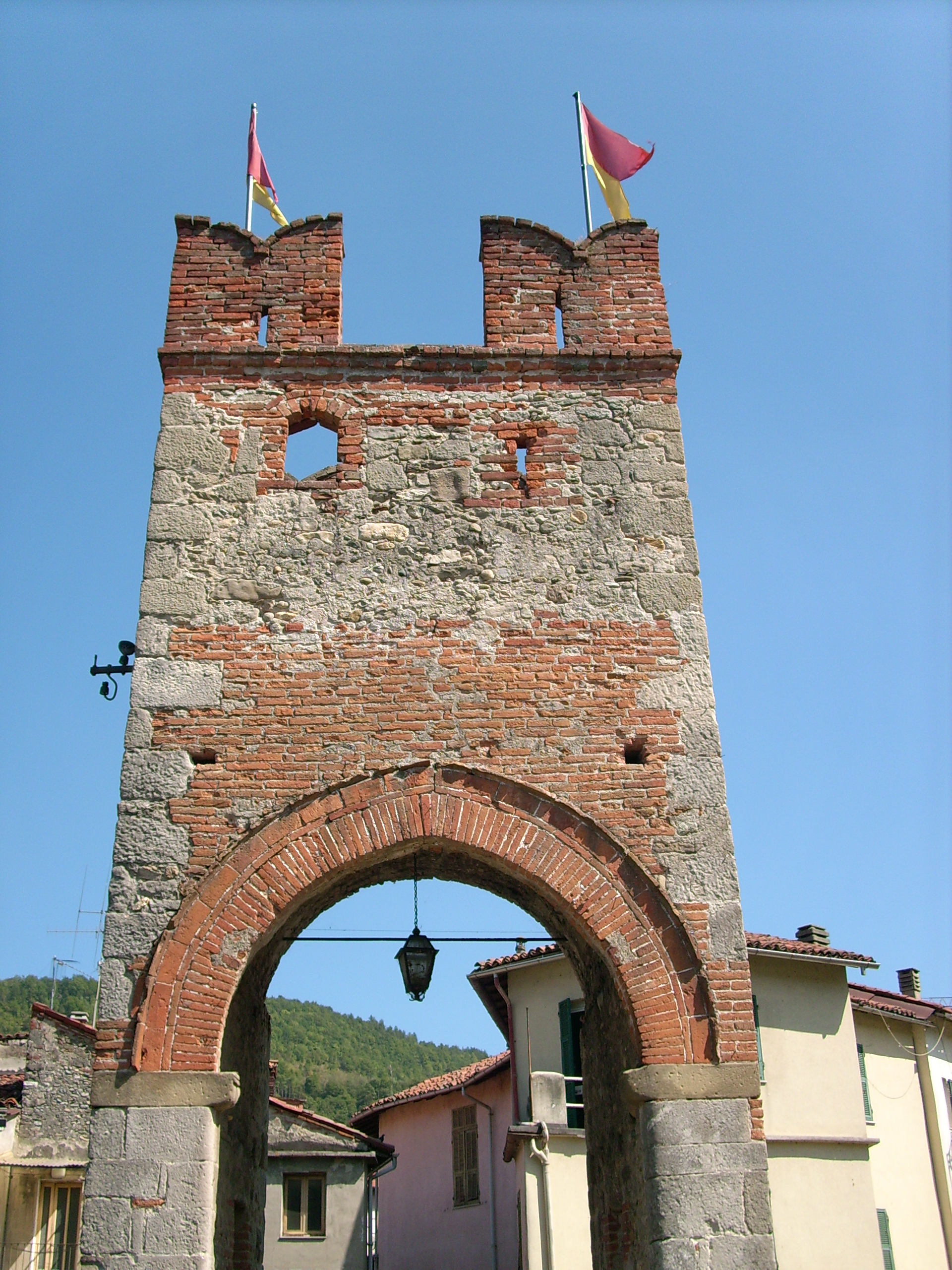 Millesimo, Liguria, Italia